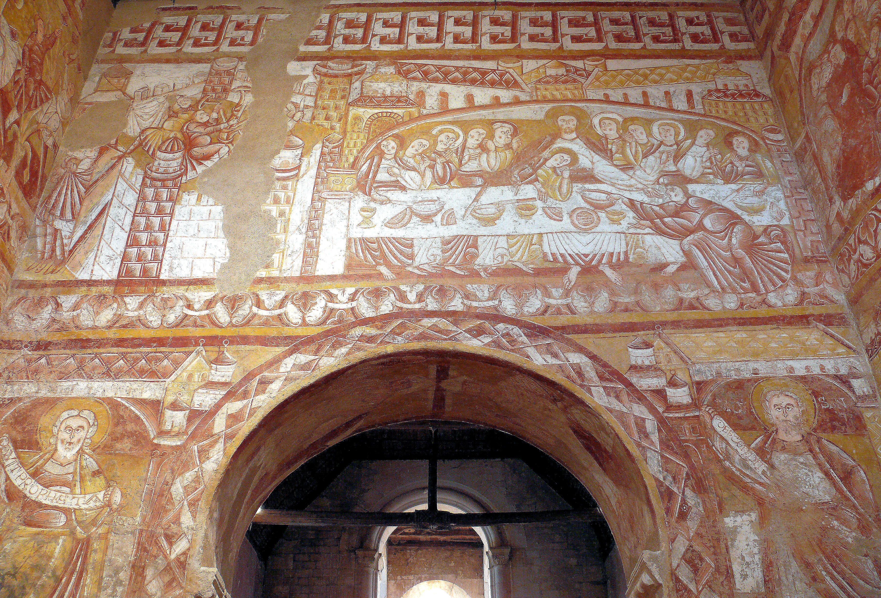 Vic - Eglise Saint-Martin - Fresque sur la mur de séparation entre la nef et le choeur côté choeur